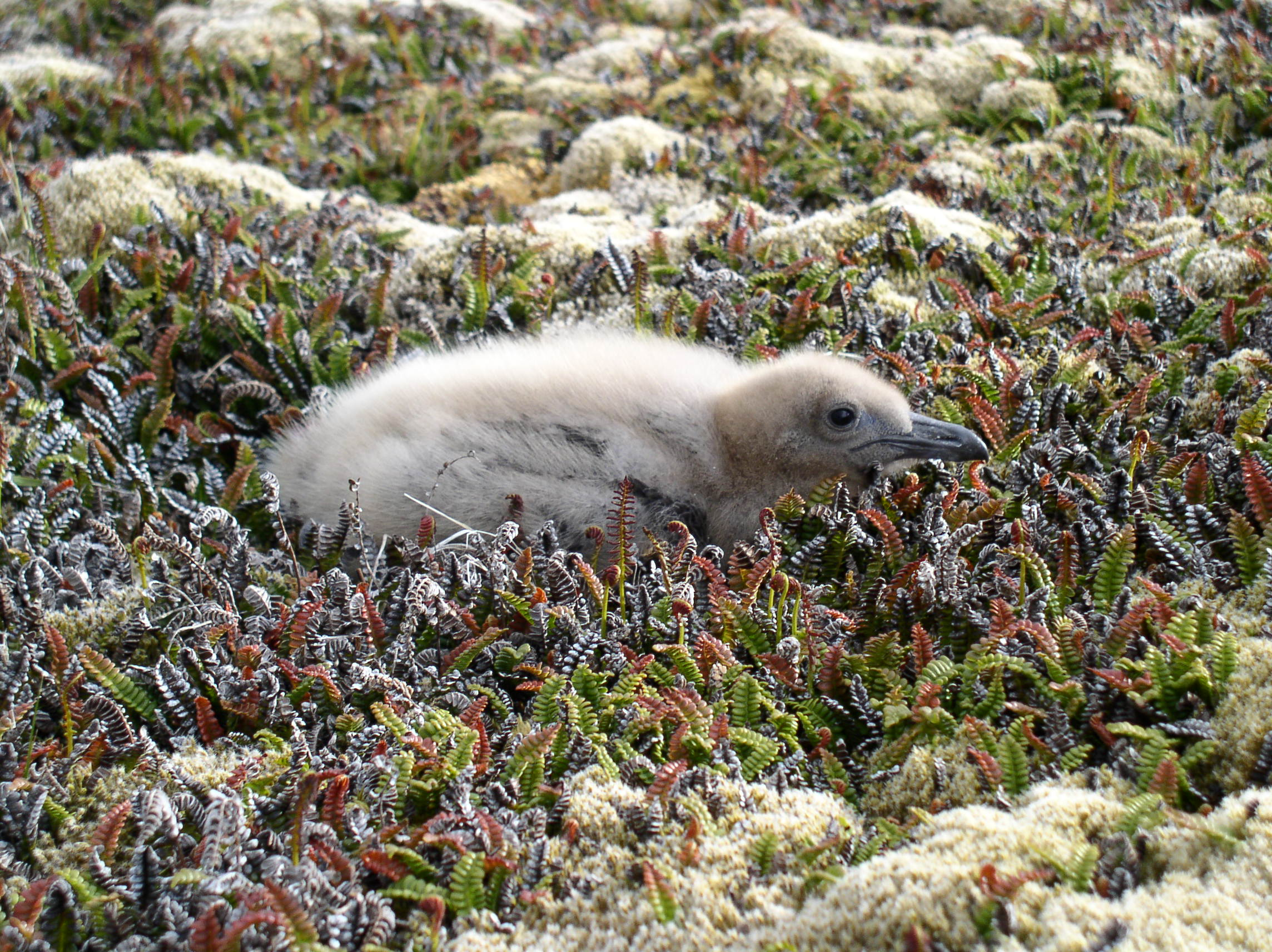 Poussin de Stercorarius antarcticus. Labbe brun, sous-espèce lonnbergi du labbe antarctique. Photo prise sur l'île de la Possession (archipel Crozet).